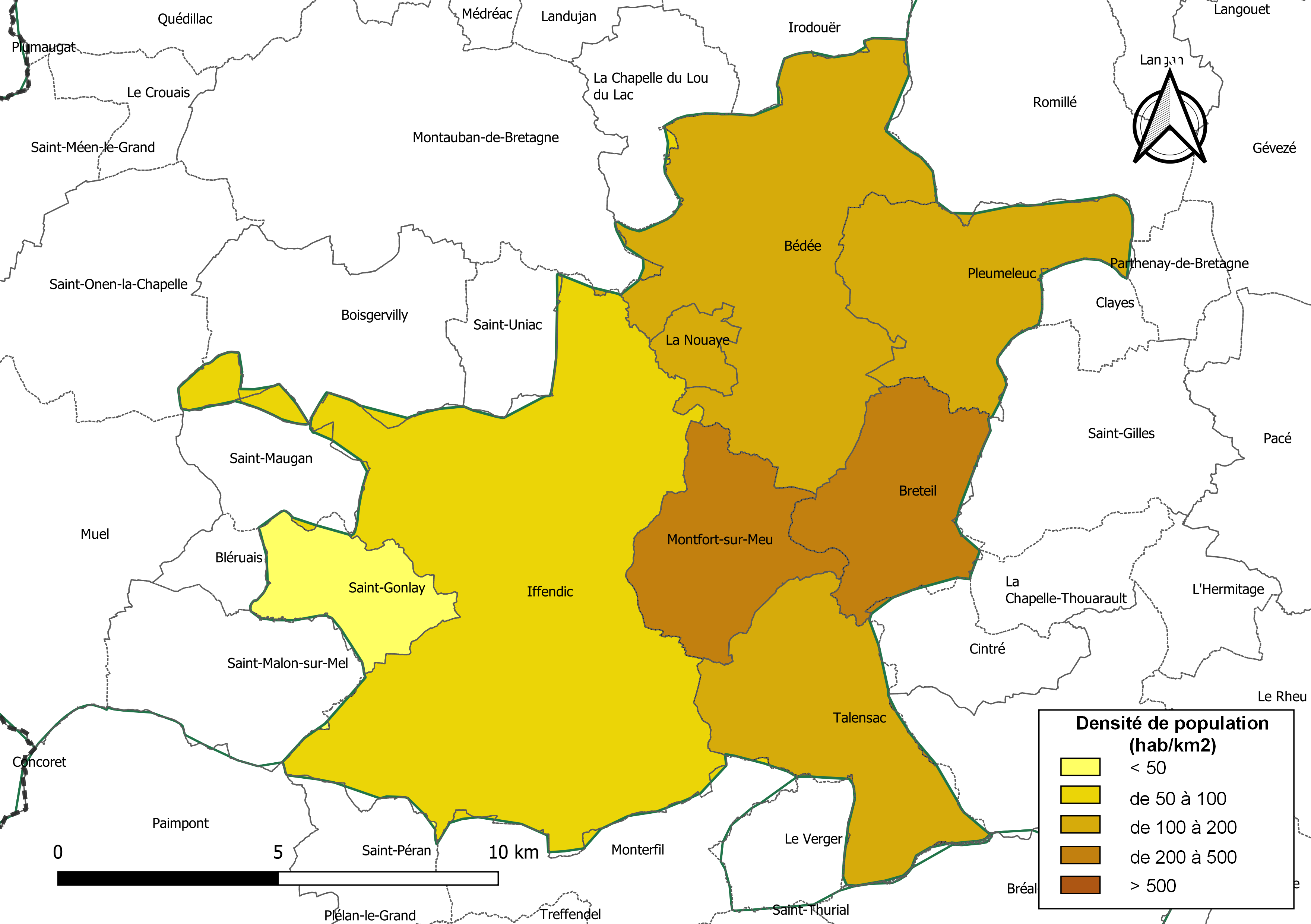 Carte des densités de population (millésimée 2016) des communes de l'intercommunalité Montfort Communauté, département d'Ille-et-Vilaine, France. Composition au 1er janvier 2019.